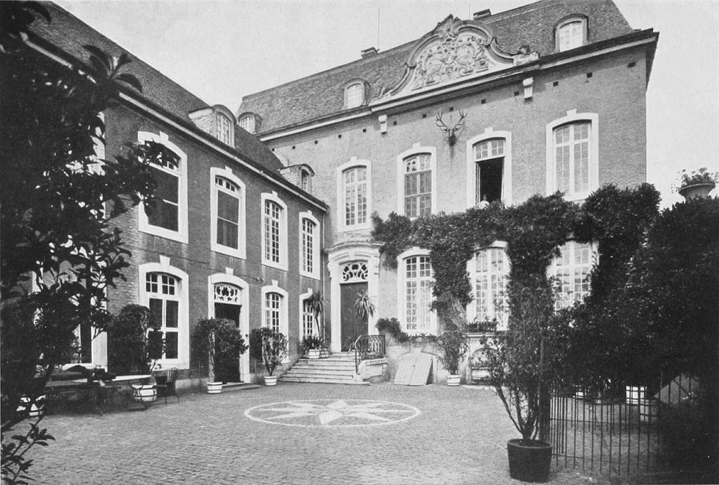 Eingang zu Gut Kalkofen, Anfang 20. Jahrhundert